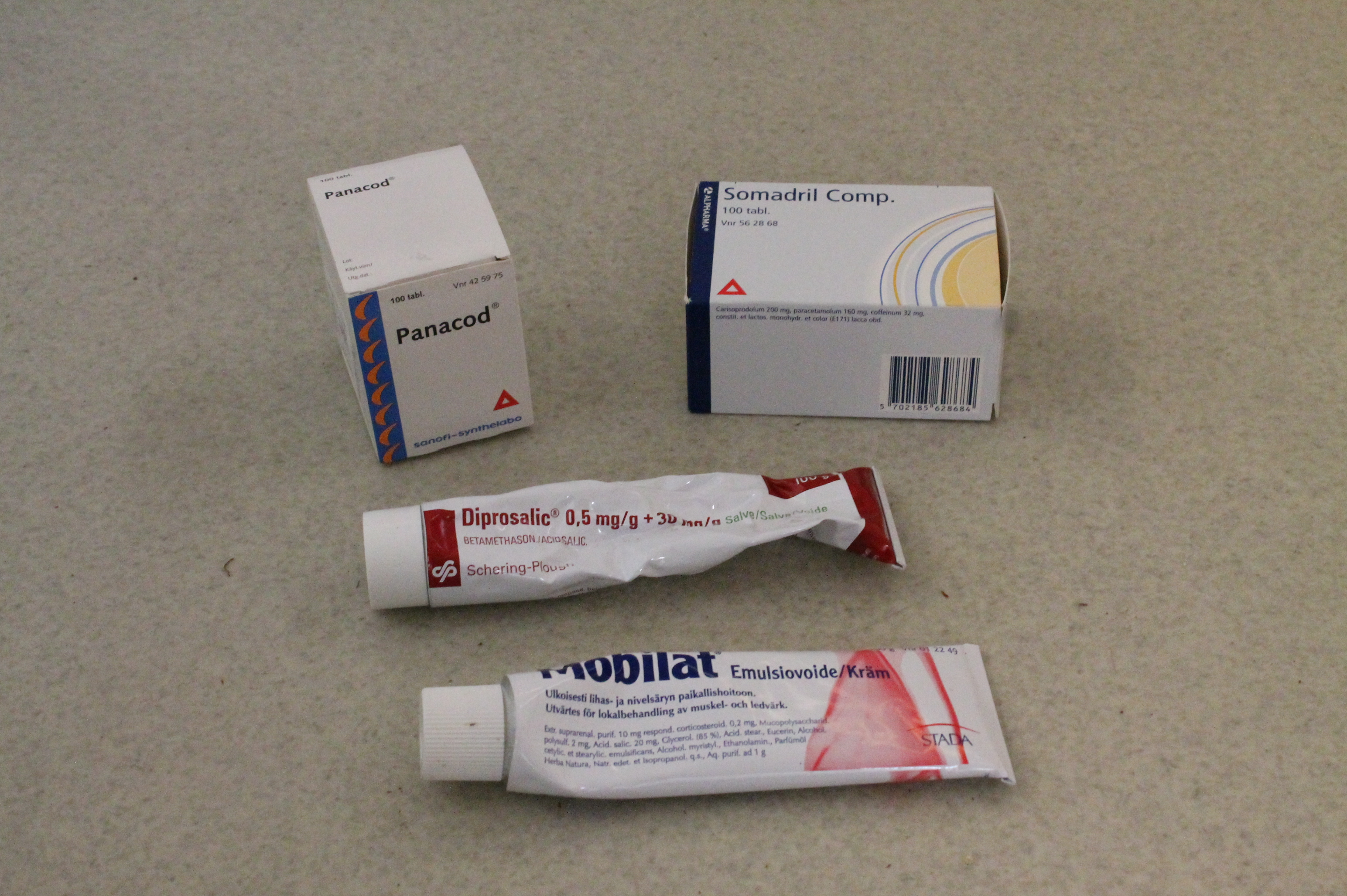 Yhdistelmälääkkeitä